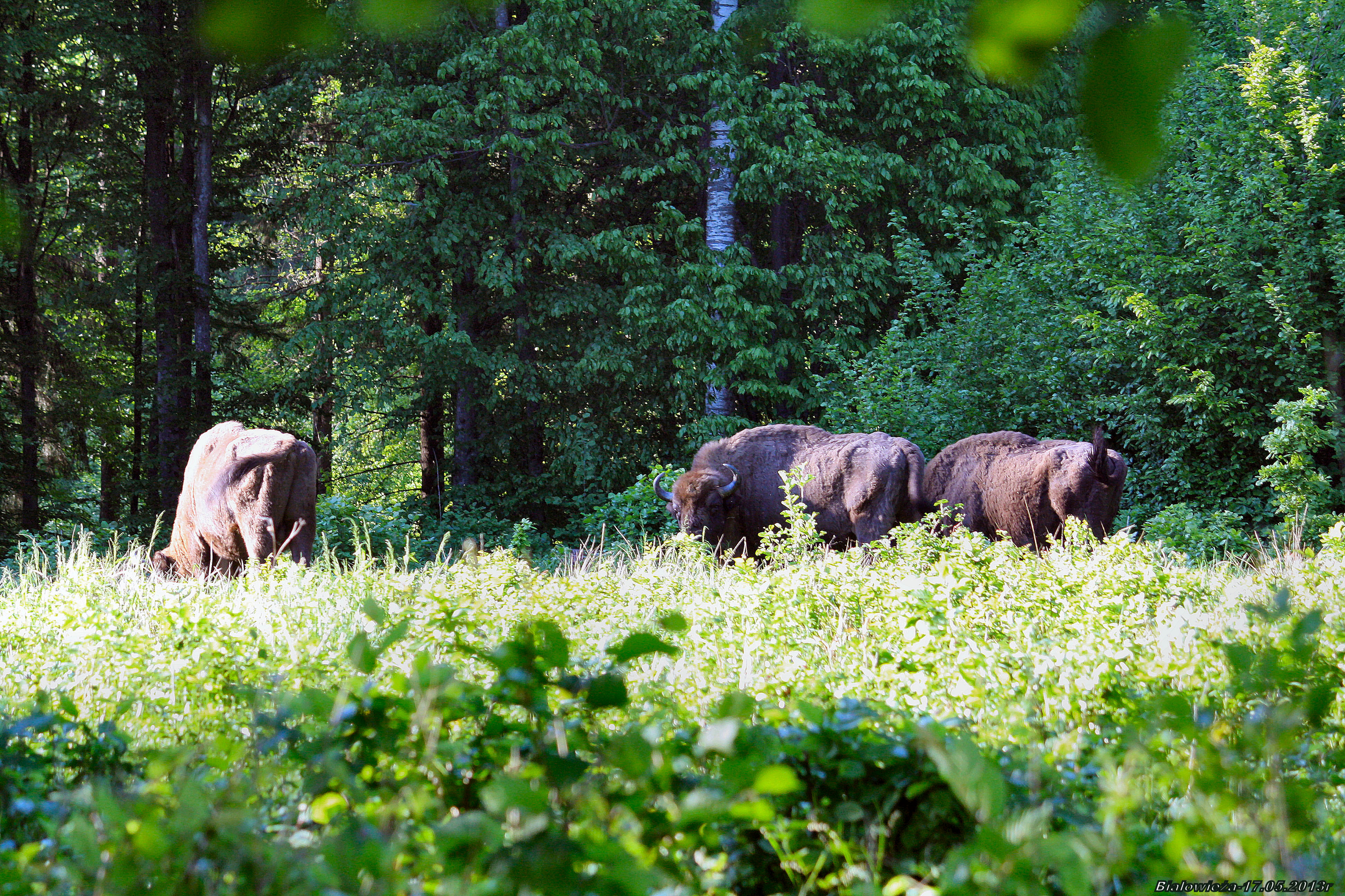 Hajnówka, Poland